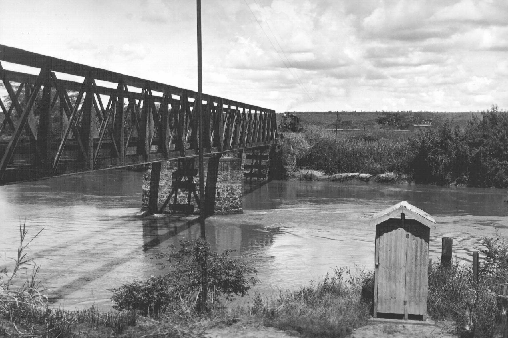 Ponte de ferro que fica na divisa de Altinópolis-SP e Sarrana-SP